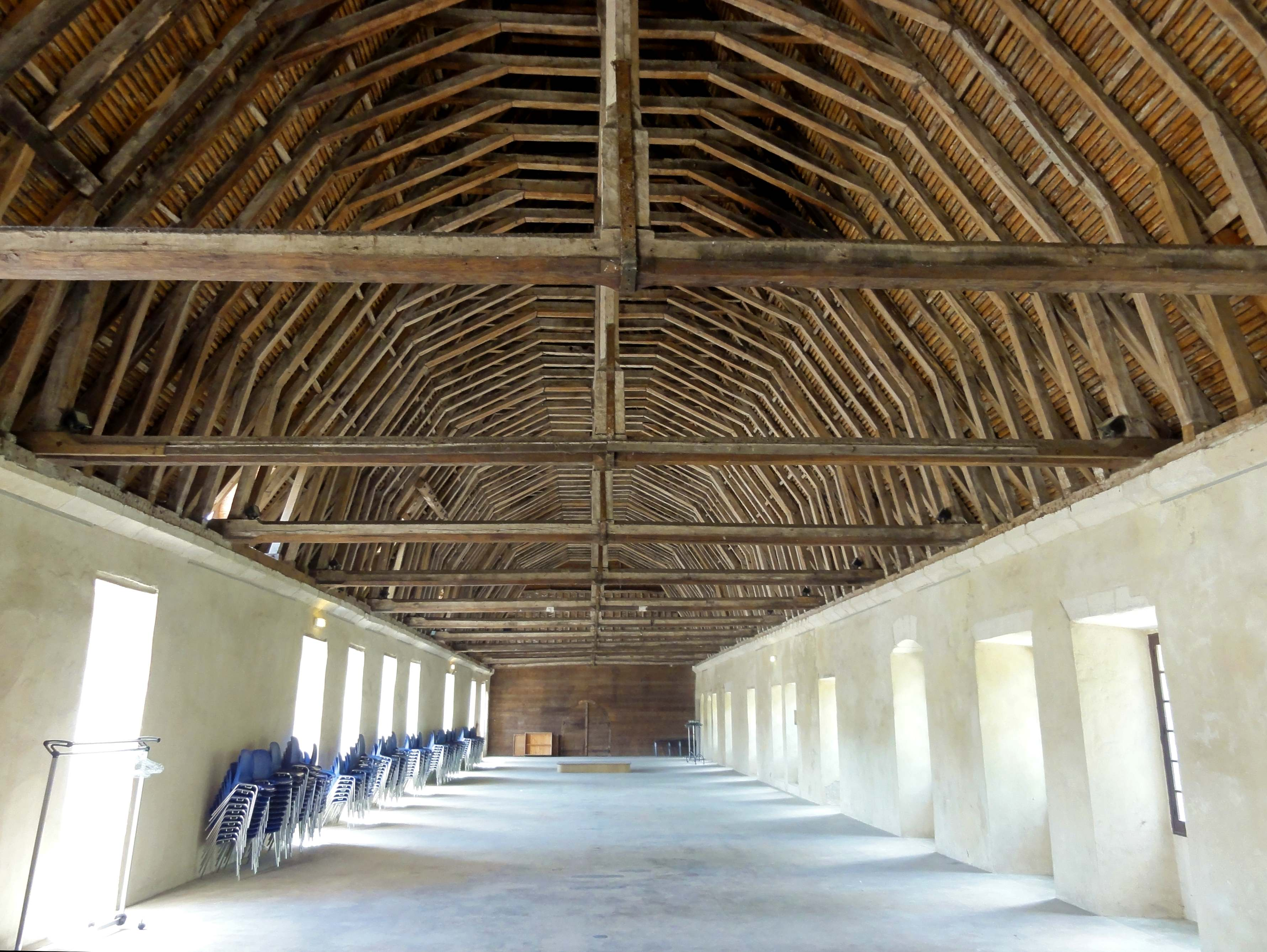 Intérieur de l'abbaye - voir titre.